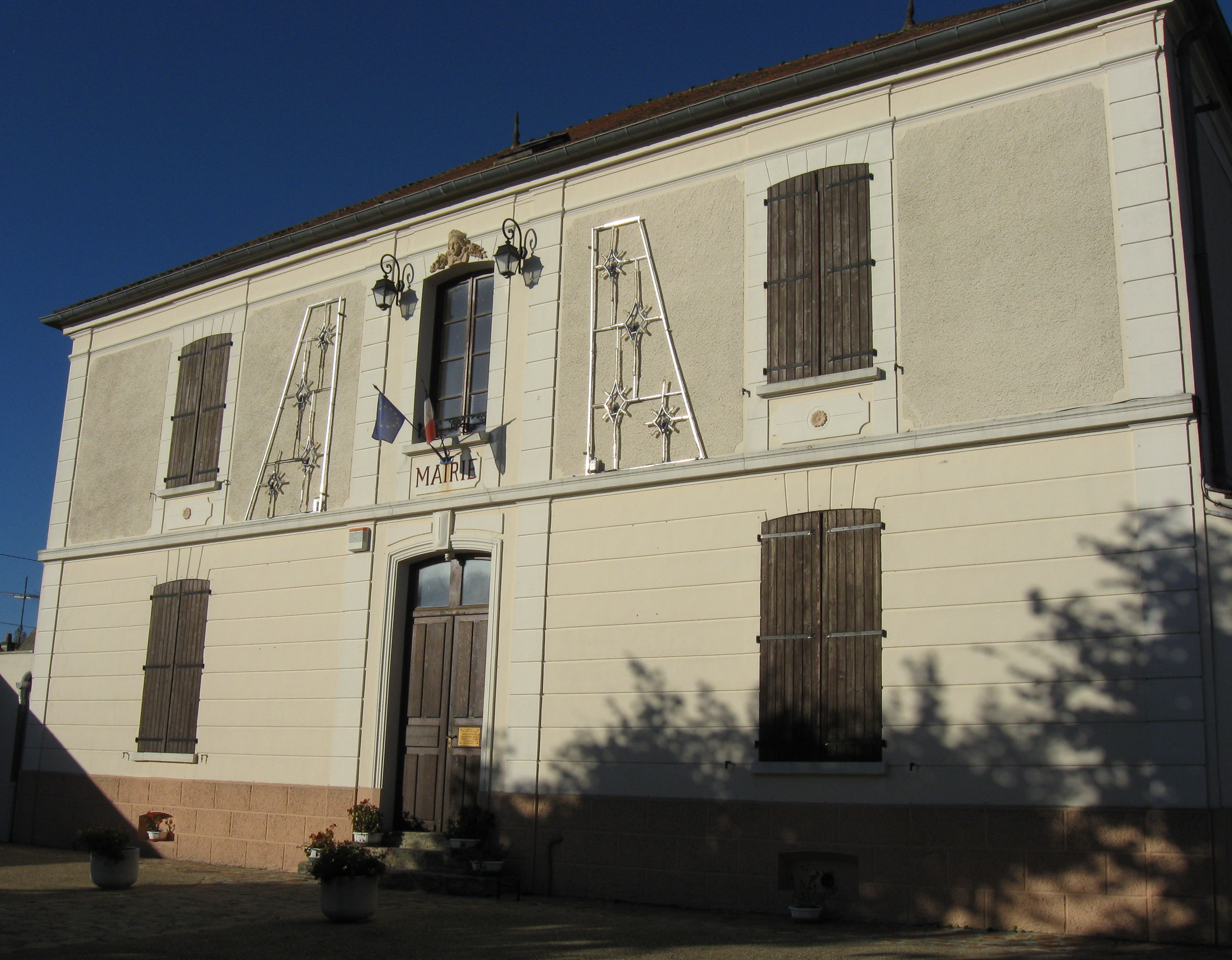 Mairie de Saint-Martin-des-Champs (département de la Seine-et-Marne, région Île-de-France).